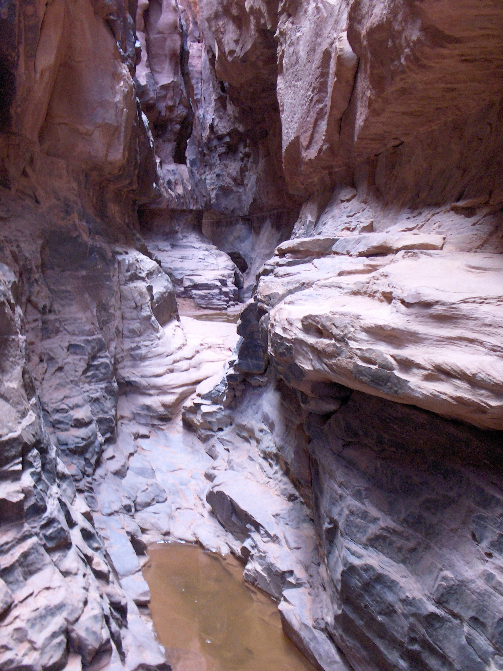 Pozze d'acqua nelle gole del Wadi Rum